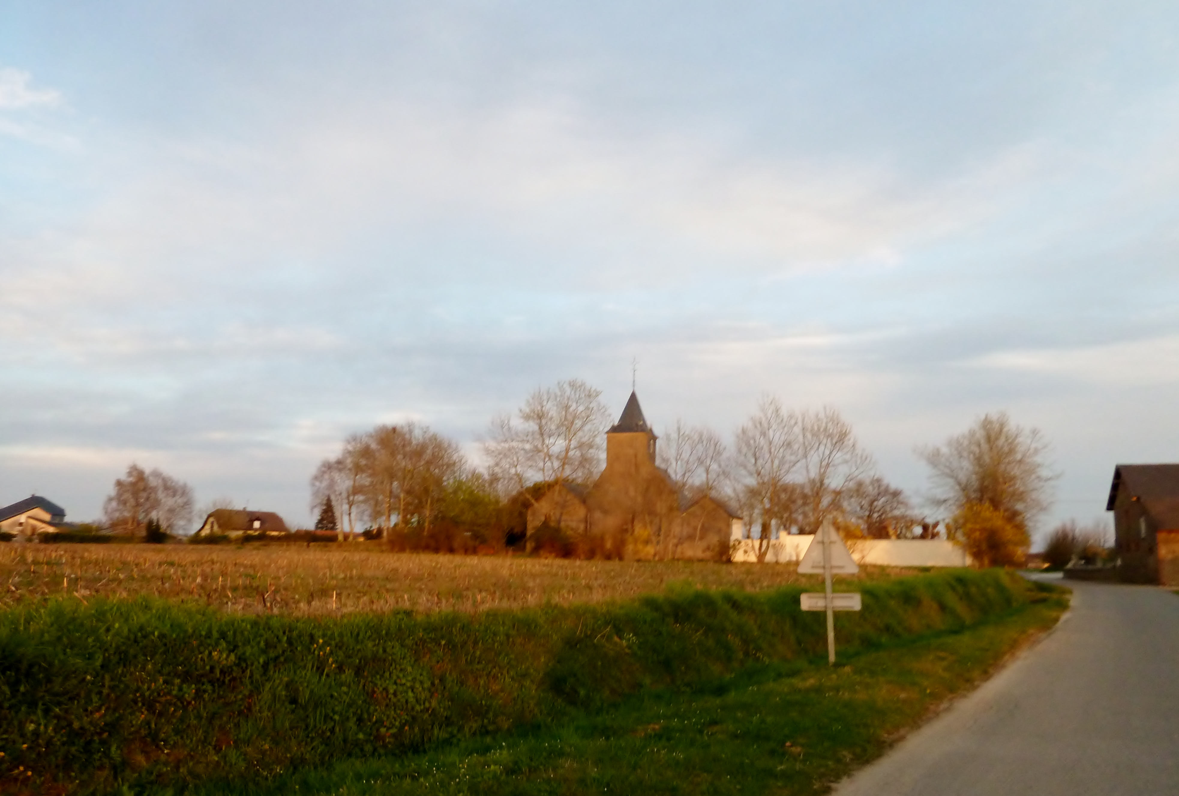 Astis